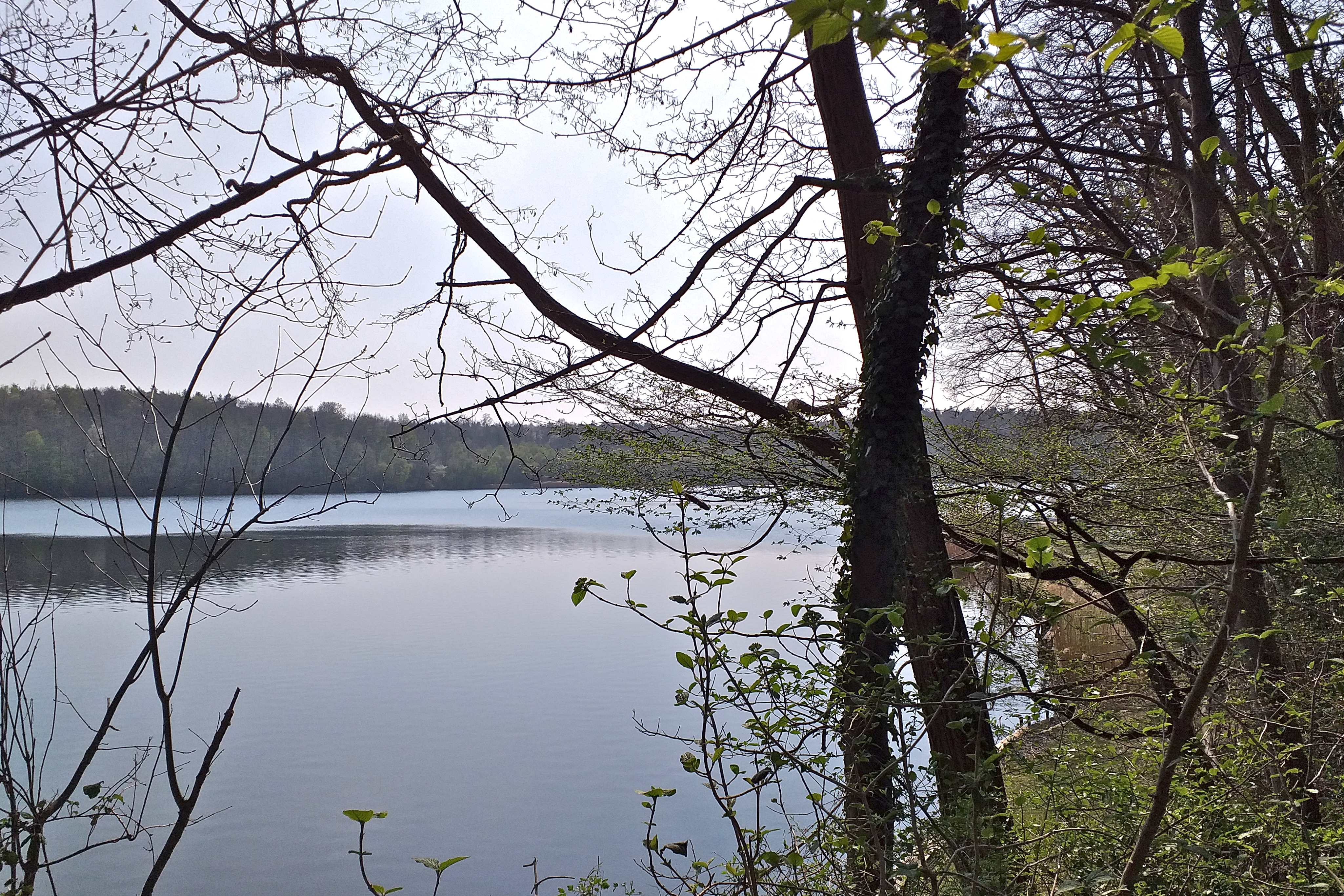 Blick auf den Berggeistweiher bei Bornheim (Rheinland, Walberberg), vom Parkplatz Berggeiststraße aus; Naturschutzgebiet Berggeistweiher (BM-024), in der Liste der Naturschutzgebiete ist es Brühl (Rheinland) zugeordnet